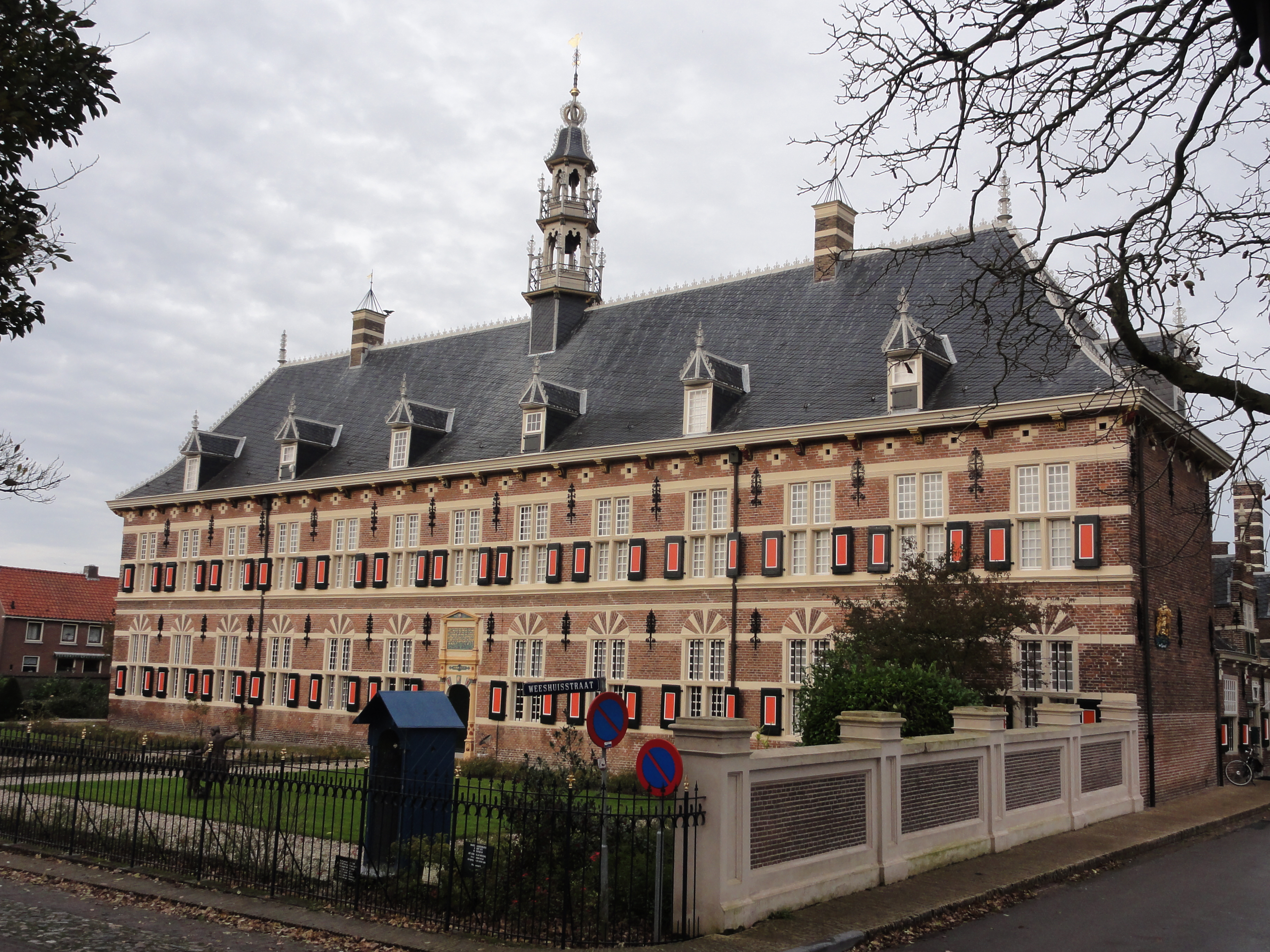 Museum der Koninklijke Marechaussee in Buren in het voormalig weeshuis Buren